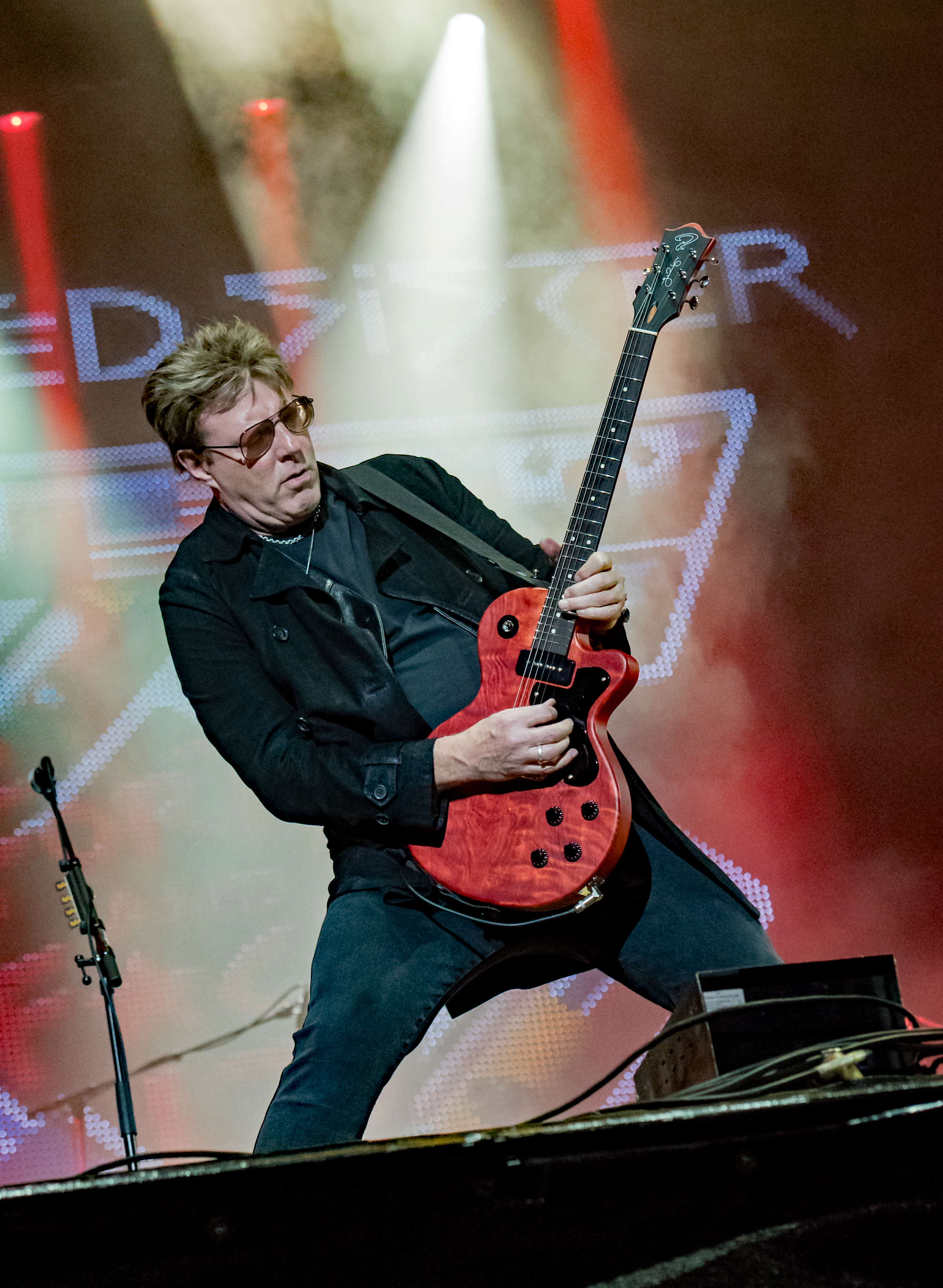 Twisted Sister beim Wacken Open Air 2016